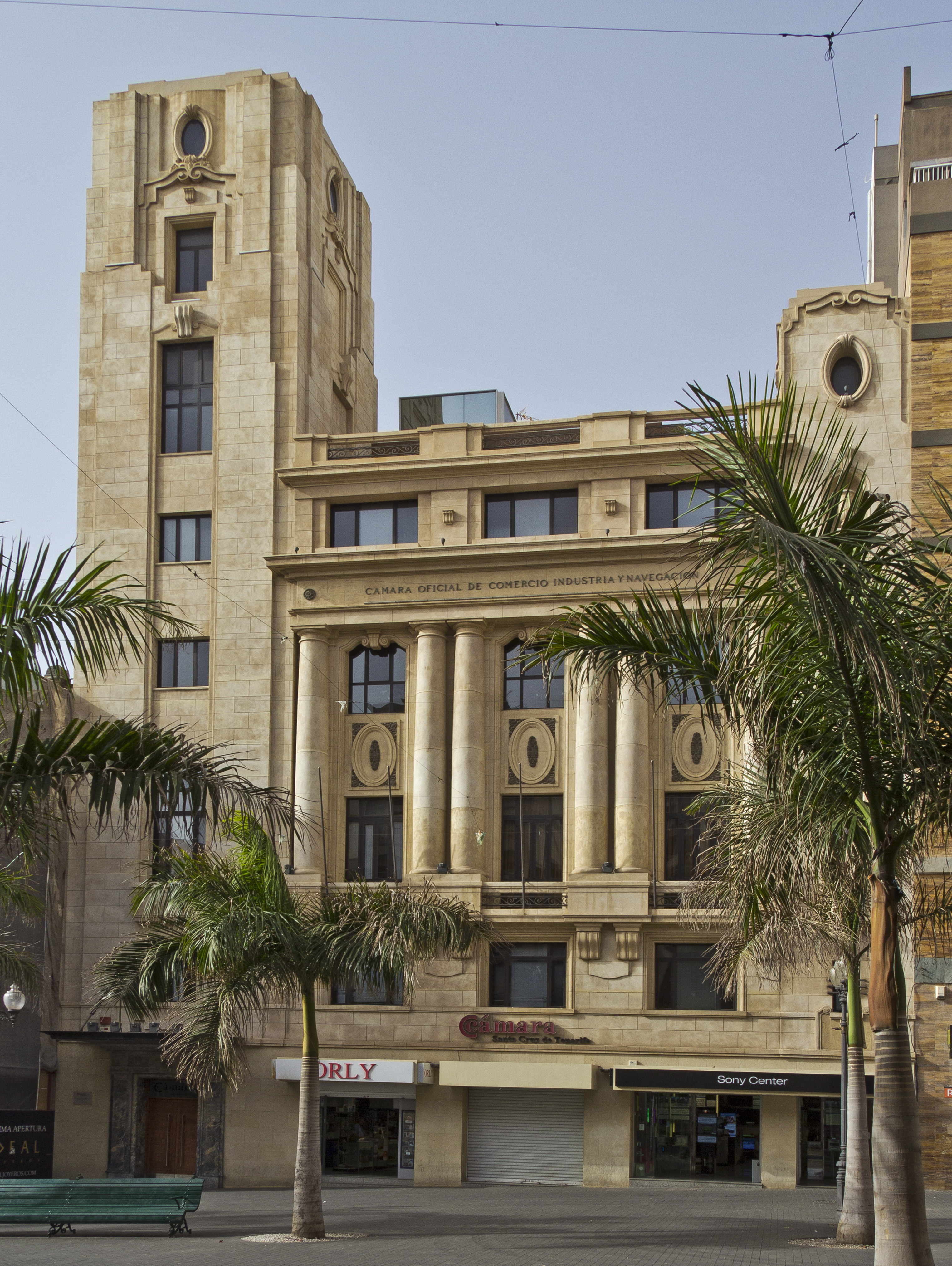 Das Gebäude der Cámara de Comercio, Industria y Navegación de Santa Cruz de Tenerife befindet sich an der Plaza Candelaria. Der Bau des Gebäudes wurde im Jahr 1933 begonnen. Im Jahr 1943 wurde das Gebäude fertiggestellt.